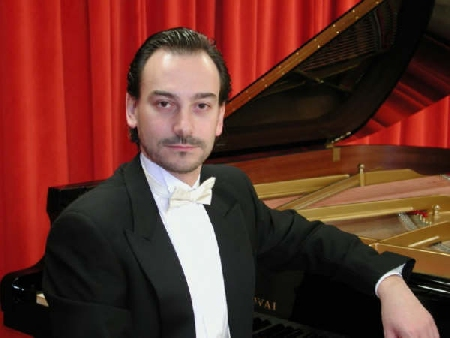 Albert Diaz